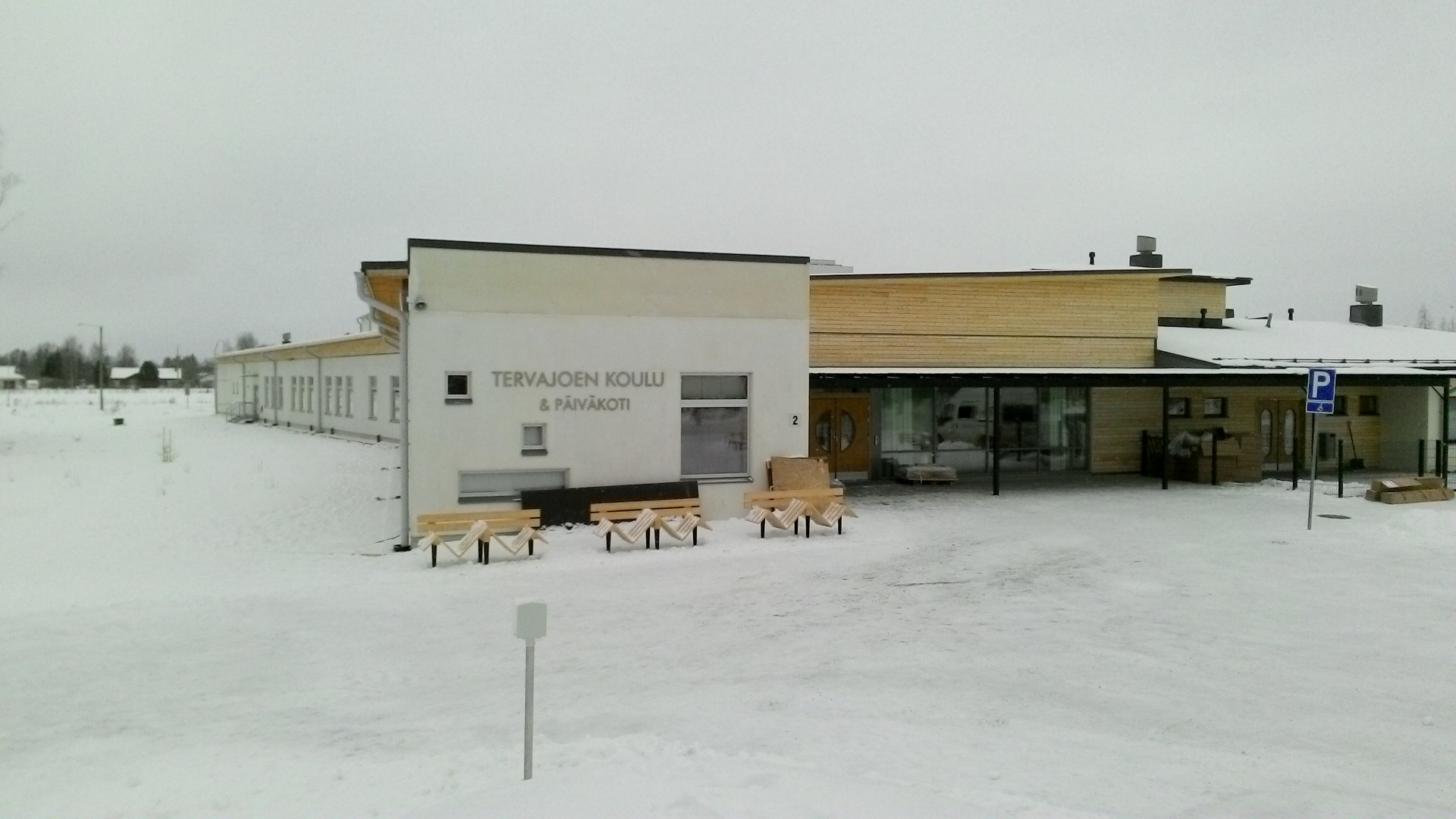 Tervajoen koulun julkisivu lounaasta.